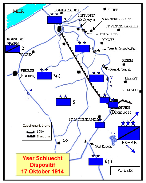 Yser Schluecht, 17 Oktober 1914, Dispositif vun der belscher Arméi. Auteur: , 29. Oktober 2007